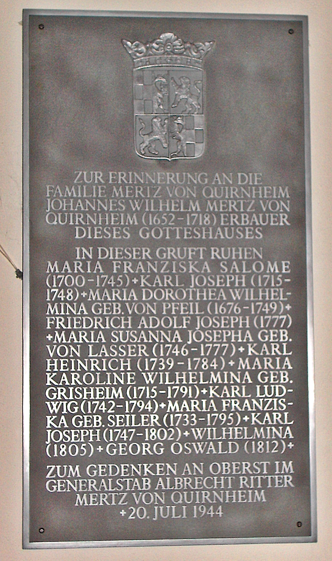 Quirnheim-Bossweiler, Rheinland Pfalz, kath. Pfarrkirche St. Oswald, Gedenktafel für Albrecht Mertz von Quirnheim und seine Ahnen.